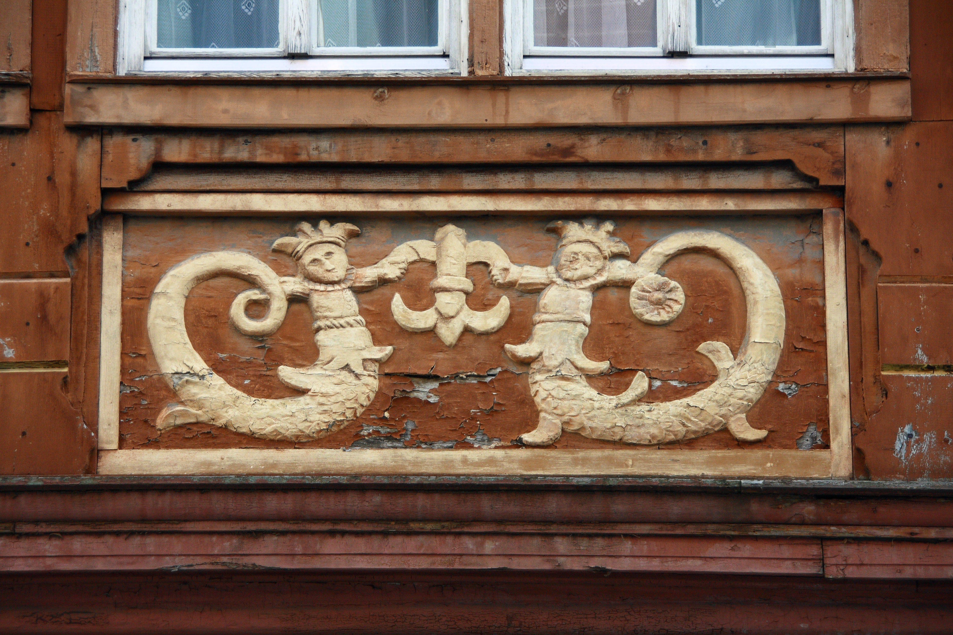 Melusinenschnitzerei am Lieblerhaus in Tauberbischofsheim.